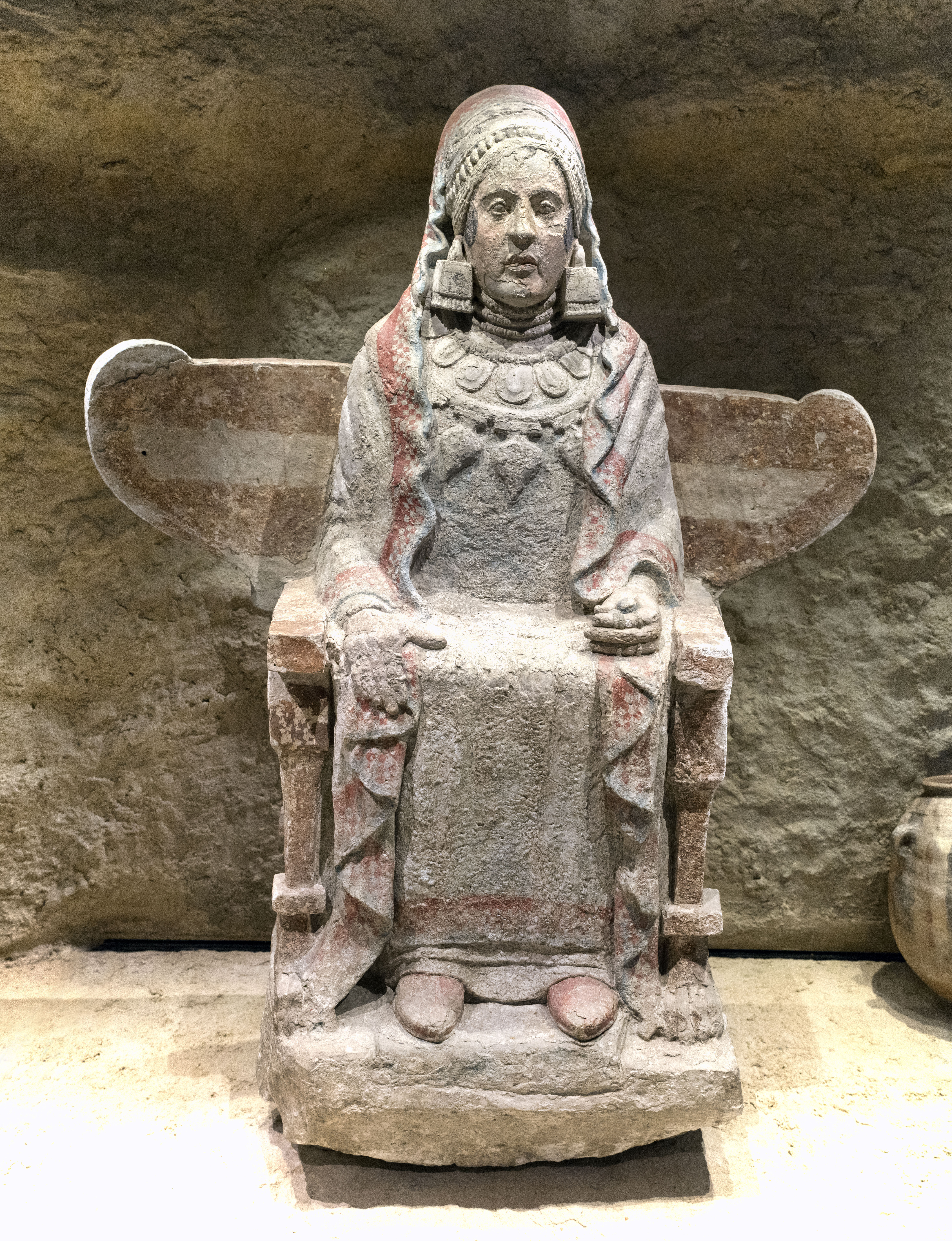 La Dama de Baza (siglo IV a.C.) se encontró el 20 de julio de 1971 en una cámara subterránea durante la excavación de la necrópolis ibérica del cerro del Santuario de Baza (Granada). Está tallada en una sola pieza de caliza, cubierta de estuco y pintada en tonos rojos, azules, blancos y negros. Se usó como recipiente cinerario ya que en el lado derecho hay un hueco donde se encontraron restos incinerados de una mujer. Disponible para su desrcarga en alta resolución.